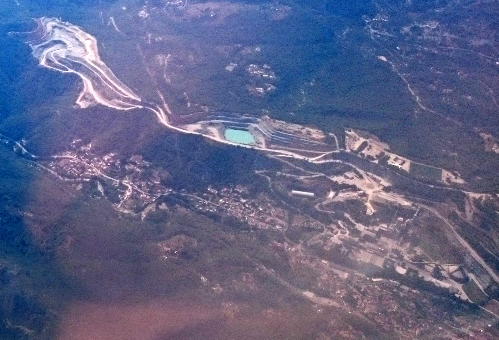 Mine de la société des ciments Vicat à Blausasc.